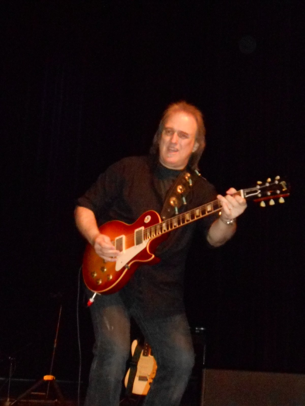 Rocky Athas lors d'un concert de John Mayall à l'Ancienne Belgique à Bruxelles en 2014.